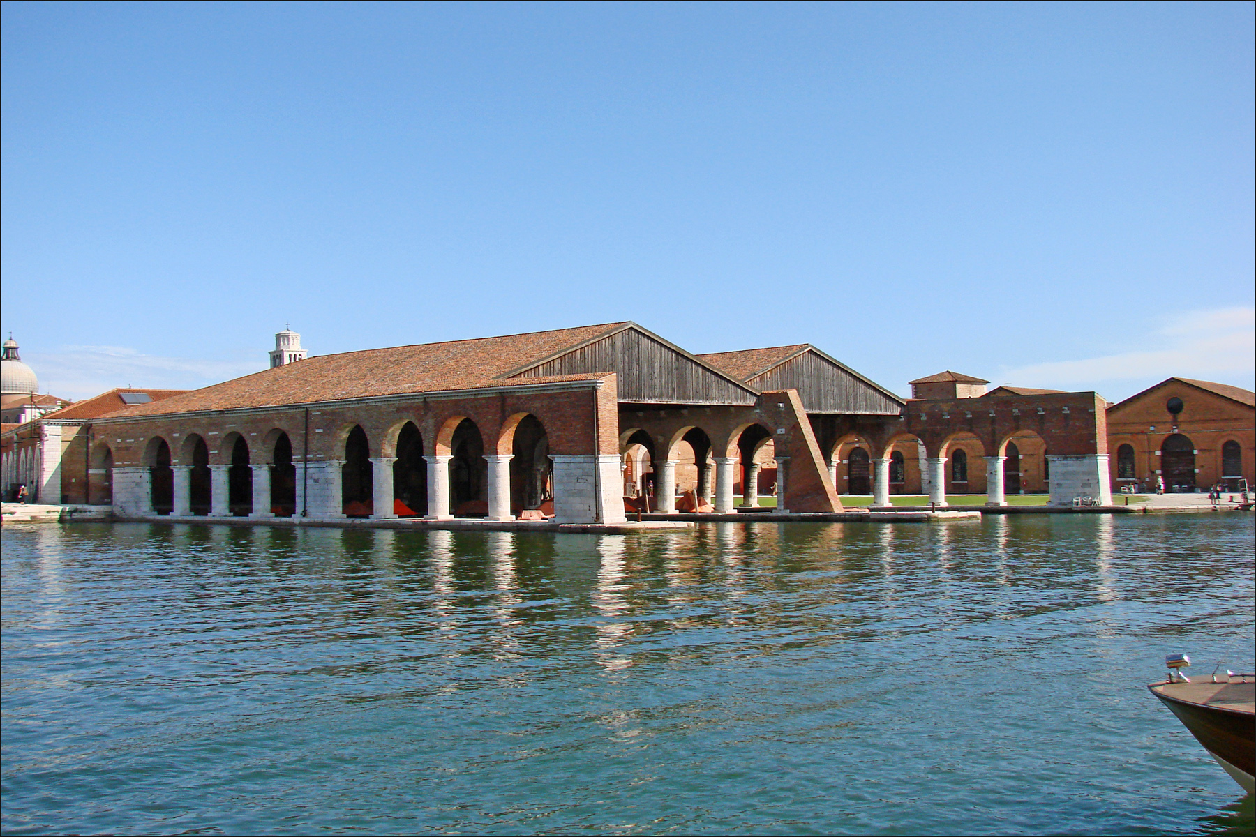 La partie ancienne de l'Arsenal de Venise (partie conçue par Sansovino) Défini par le gouvernement de la République comme le " coeur de l'état vénitien ", l'Arsenal fondé en 1104 par le Doge Falier, devint le plus puissant chantier naval du monde. Ceint par 3 km de murailles crénelées rouges, il a employé jusqu'à 16.000 personnes